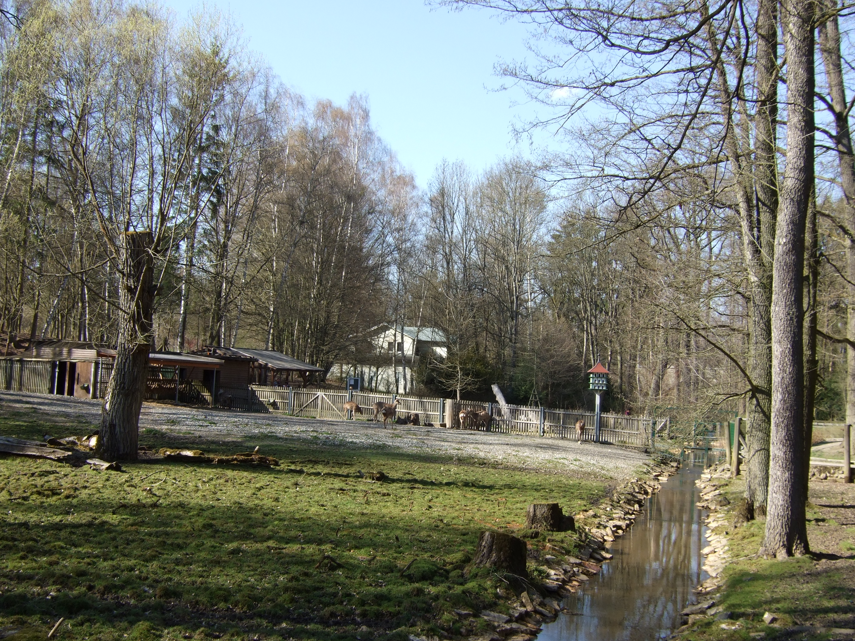 Tiergehege im Röhrenseepark mit Aubach